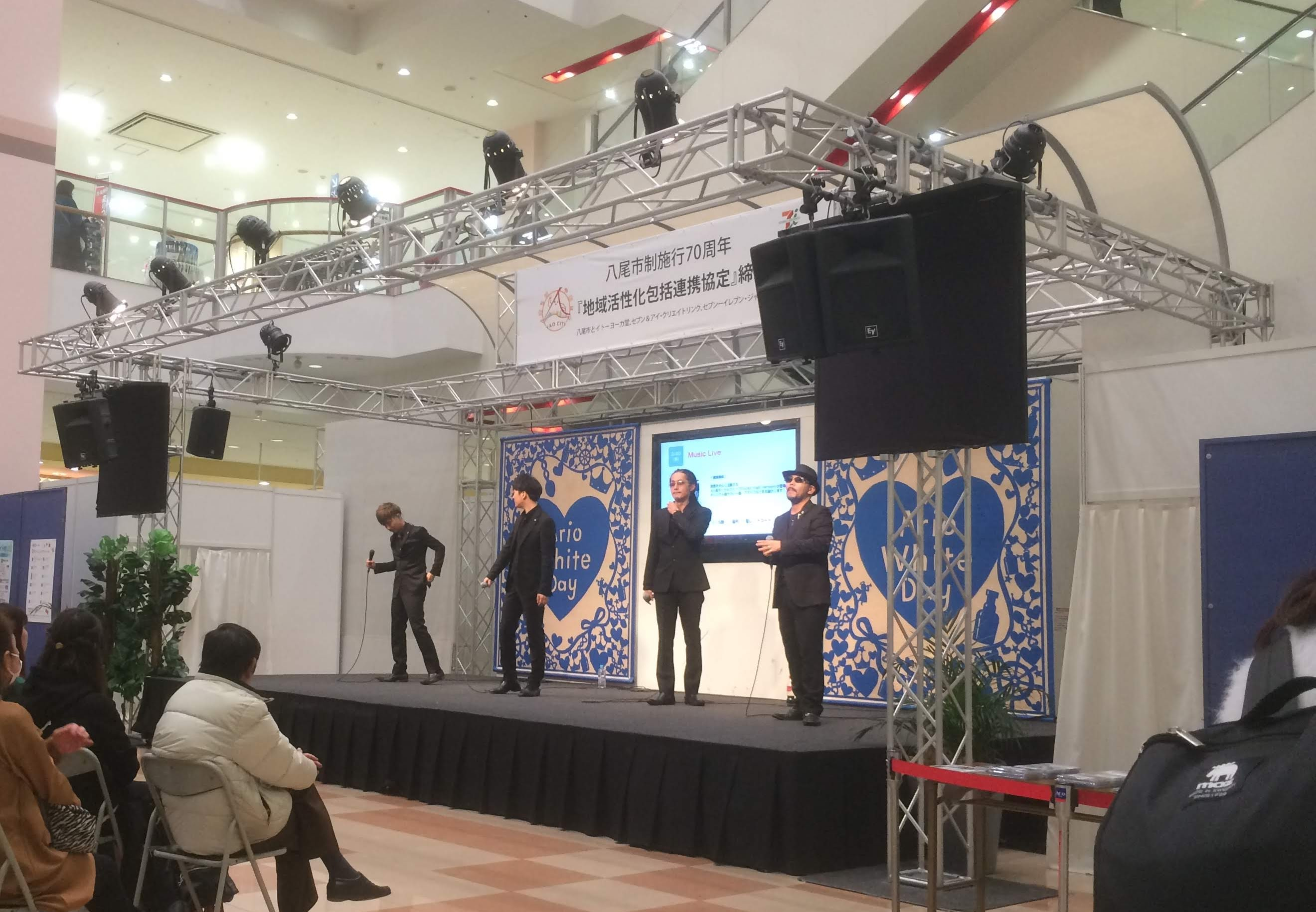 Cooley High Harmonyの八尾公演